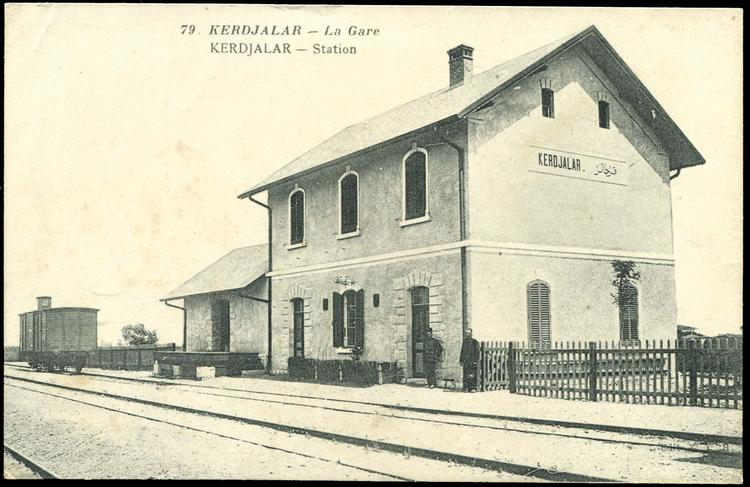 Гарата в Кърджалиево, днес Адендро, Гърция).